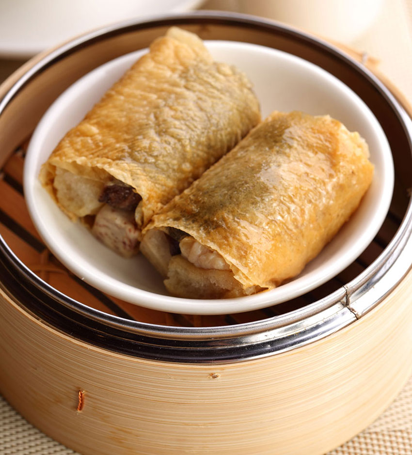 香港茶樓的點心雞扎